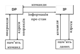 Фон-нейманівська архітектура1